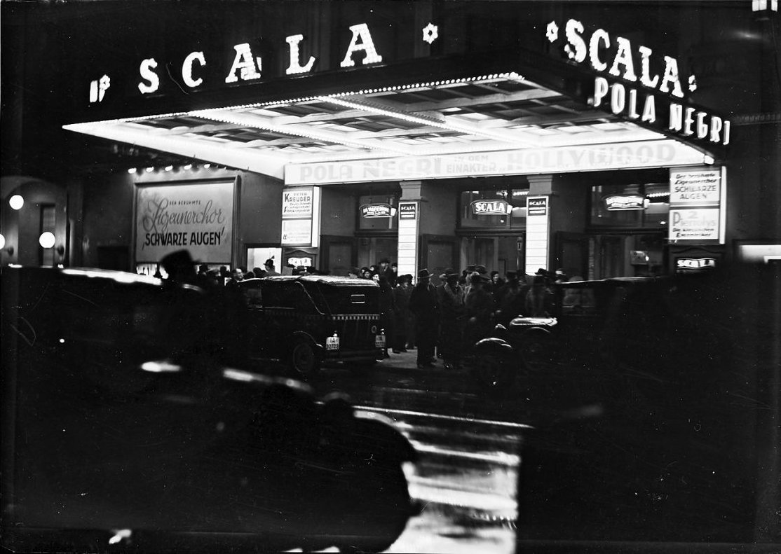 Scala (Berlin): Scala Anfahrt